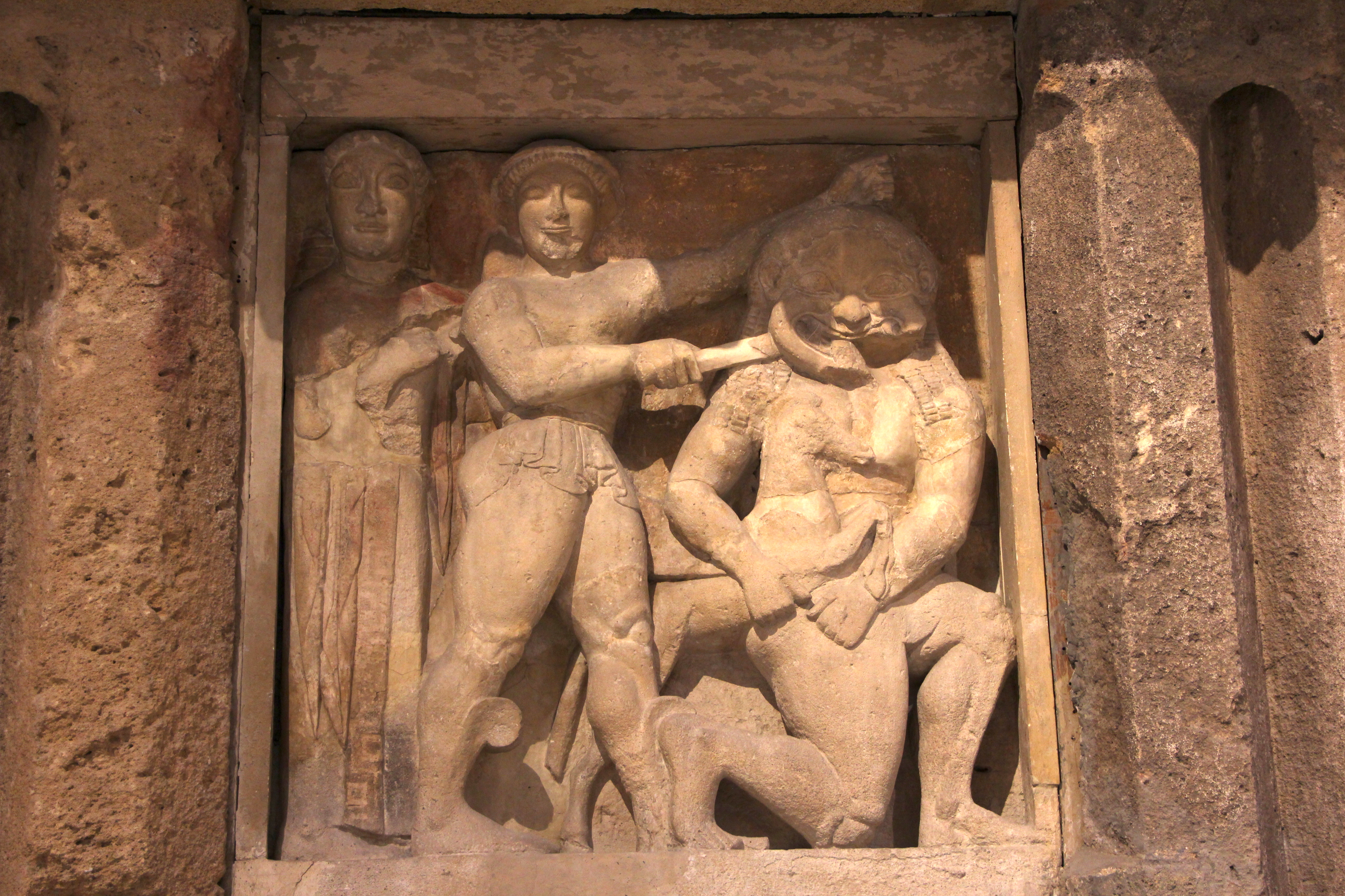 Métope du temple C de Sélinonte montrant Persée décapitant Méduse qui tient Pégase dans ses bras. Vers 540-510 avant J.-C.